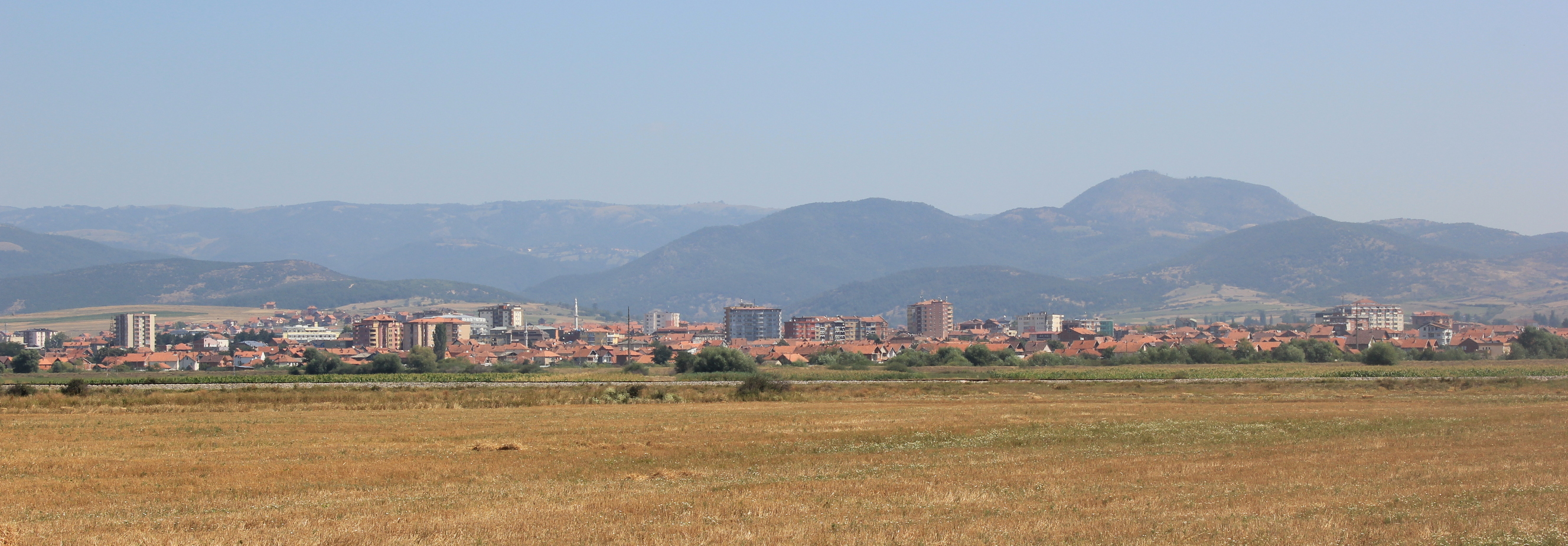 Die Stadt Vushtrria (Vučitrn) im Kosovo.Hornjoserbsce: Město Vushtrria (Vučitrn) w Kosowje.